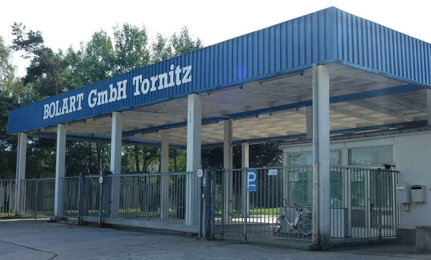 Bolart GmbH in Teupitz